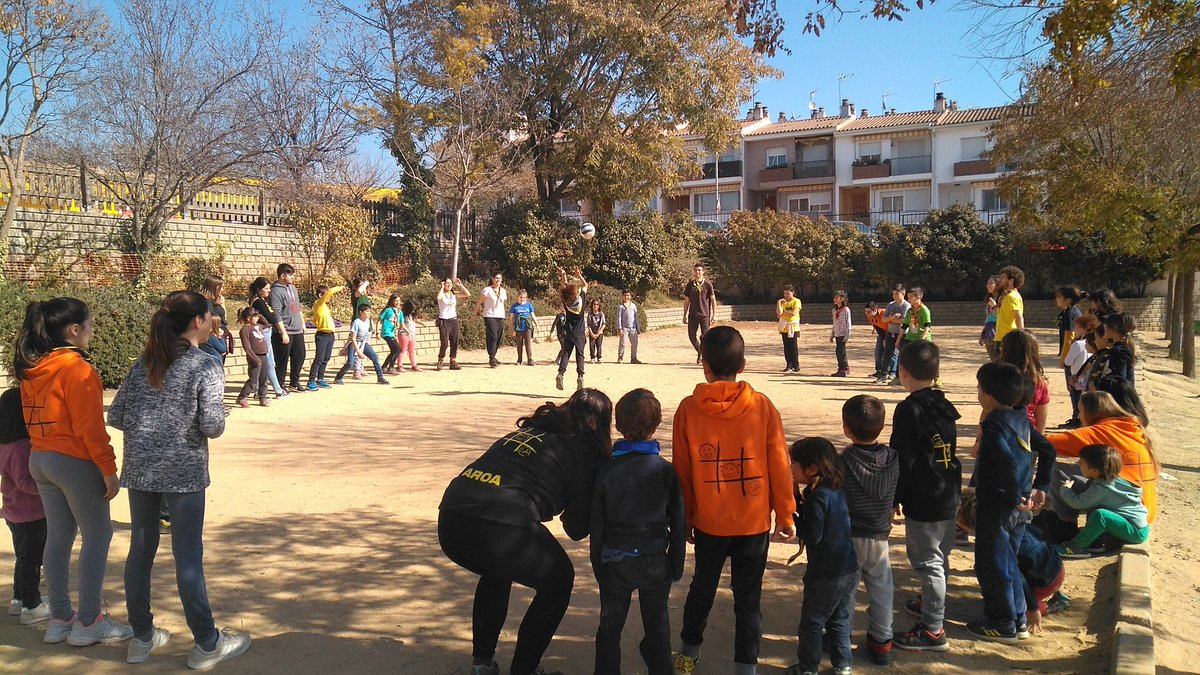 La importància del dinamisme i la participació en les accions educatives d'èxit. Esplai G.E.P.A.